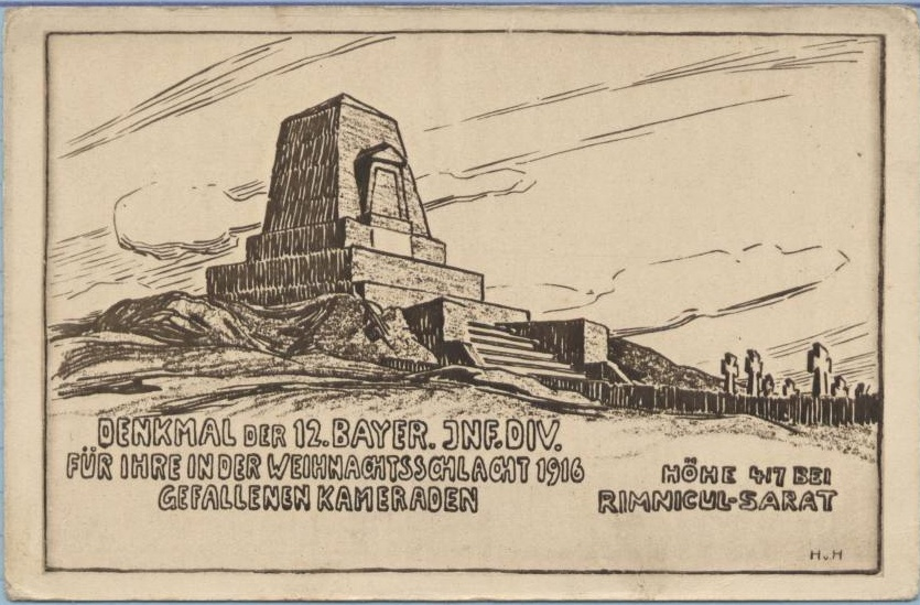 Hugo von Huller (1859-1931), Generalleutnant u. Divisionskommandeur, 12. Bay. Inf. Division. Von ihm gezeichnete und signierte Postkarte, verlegt vom Divisionspfarrer Jakob Weis